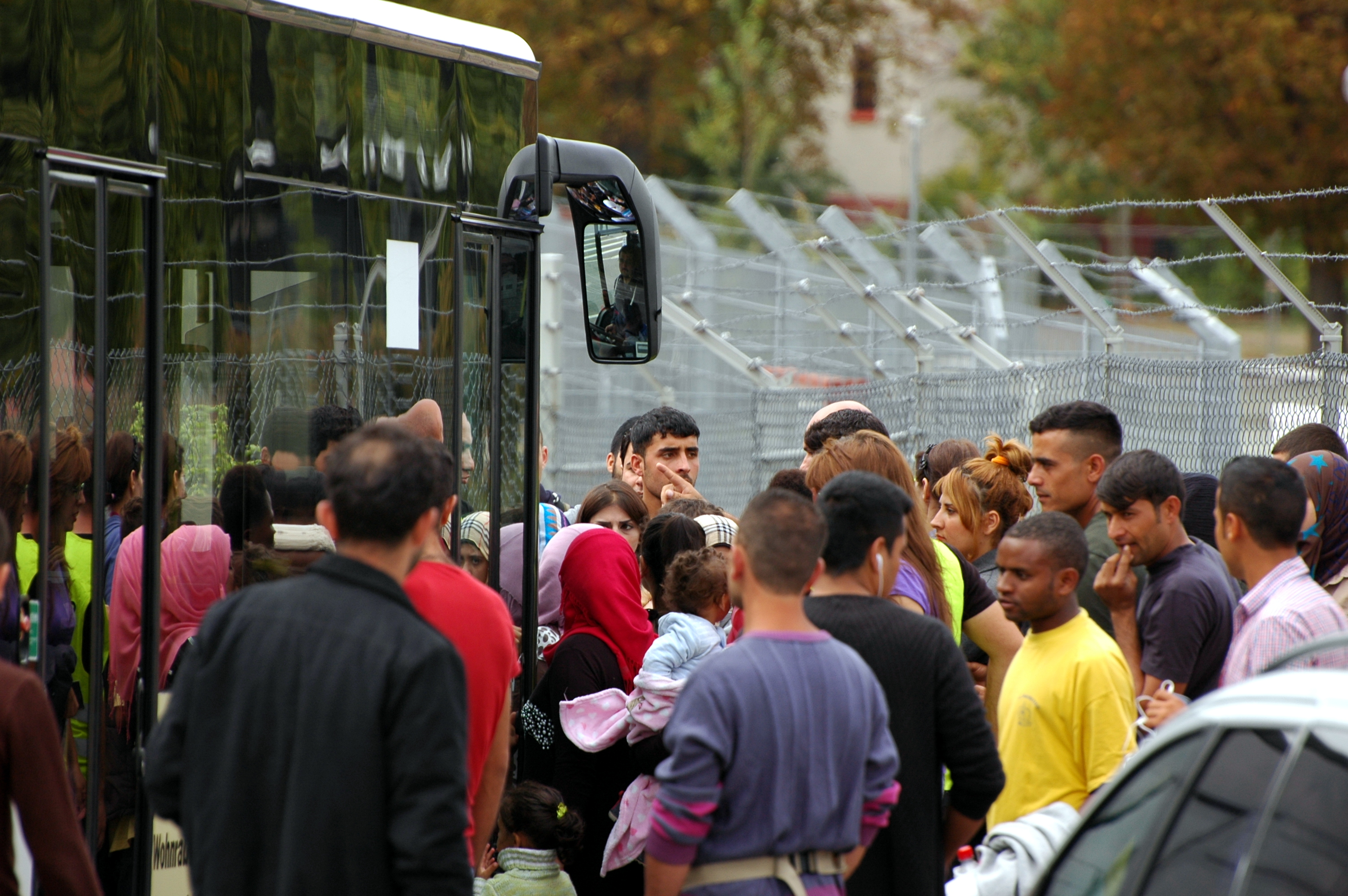 Migranten in Heidelberg